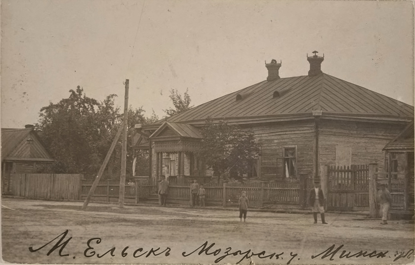 Беларуская (тарашкевіца): Ельск (Jelsk)